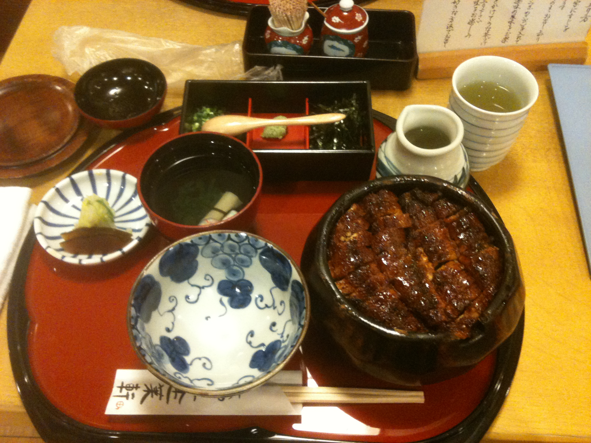 ひつまぶし